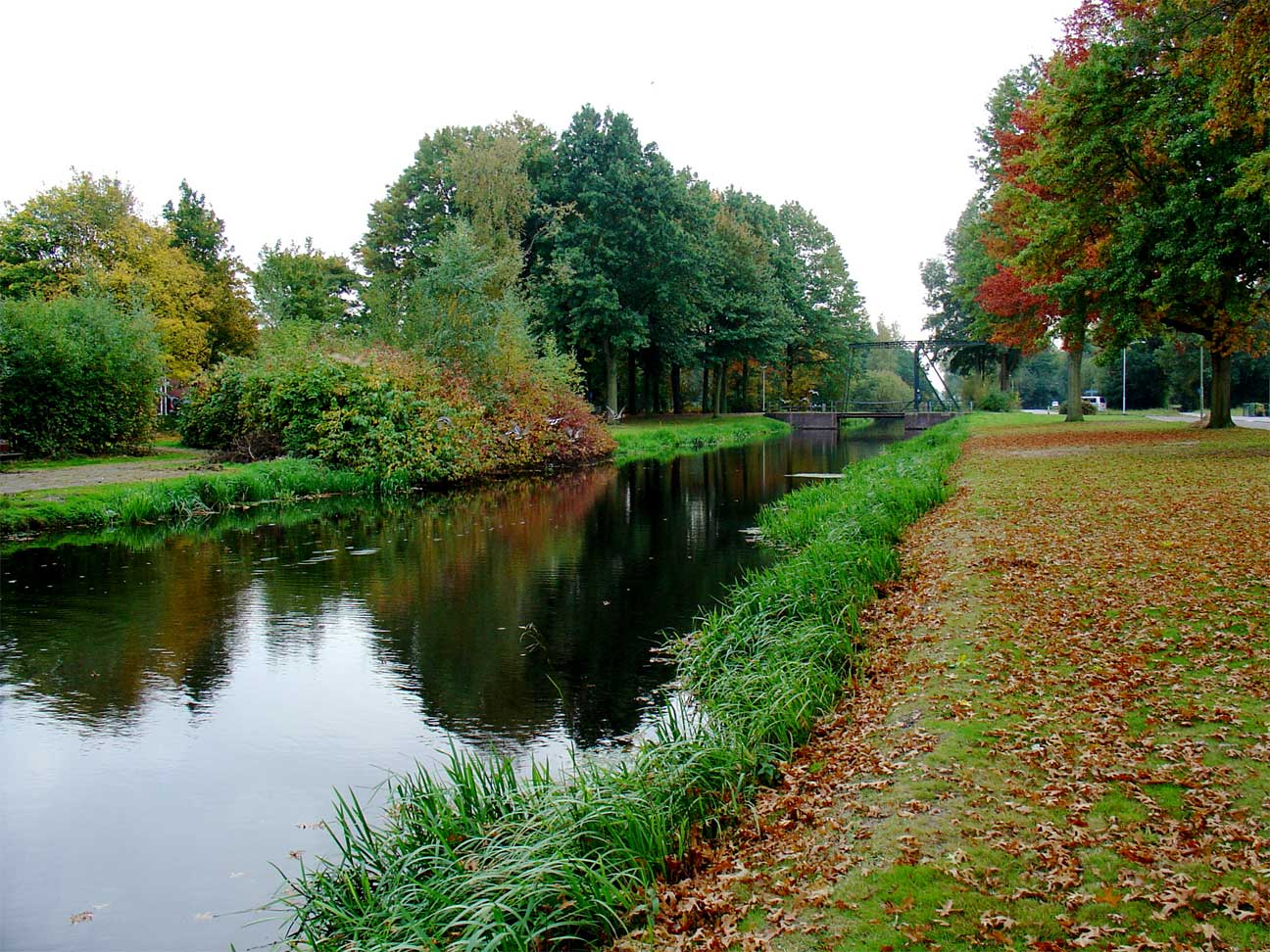 De Molenwijk in Klazienaveen